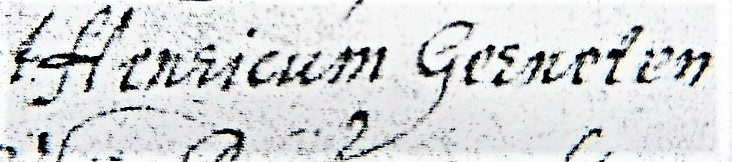 Änderung der Schreibweise des Namens Gernot zu Gernert in eine Gerichtsurkunde